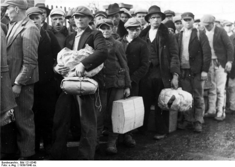 Polnische Landarbeiter auf dem Wege nach Deutschland (Freiwillige)